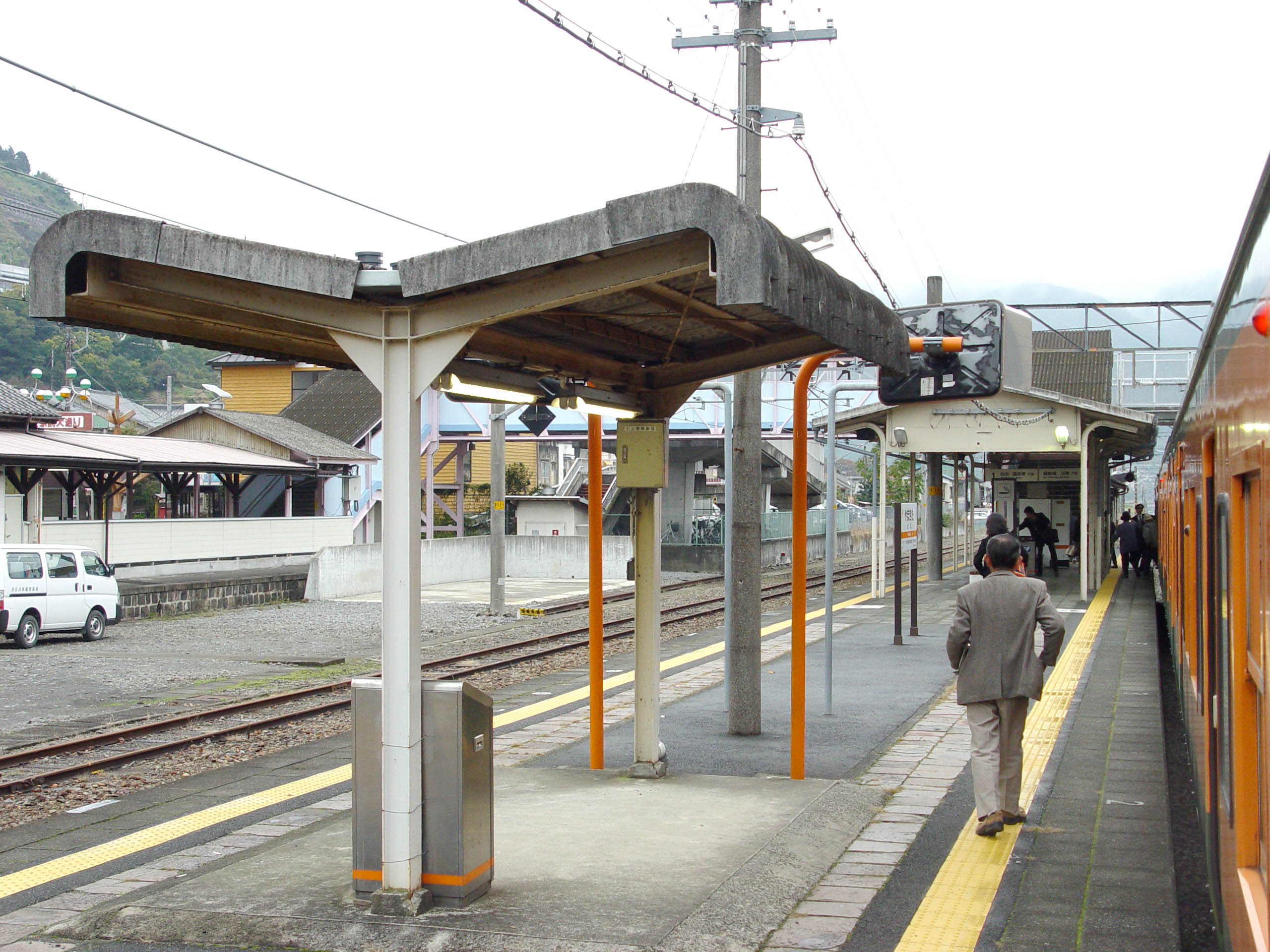 Yamakita Station, Gotenba Line, Japan